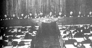 1955年，中国共产党全体代表大会。